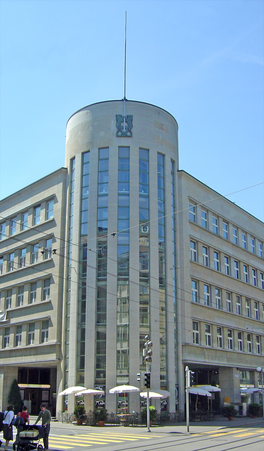 Die Alte Börse in Zürich vom Paradeplatz aus gesehen